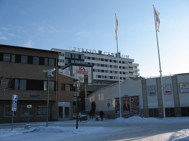 Foto:Bengt B